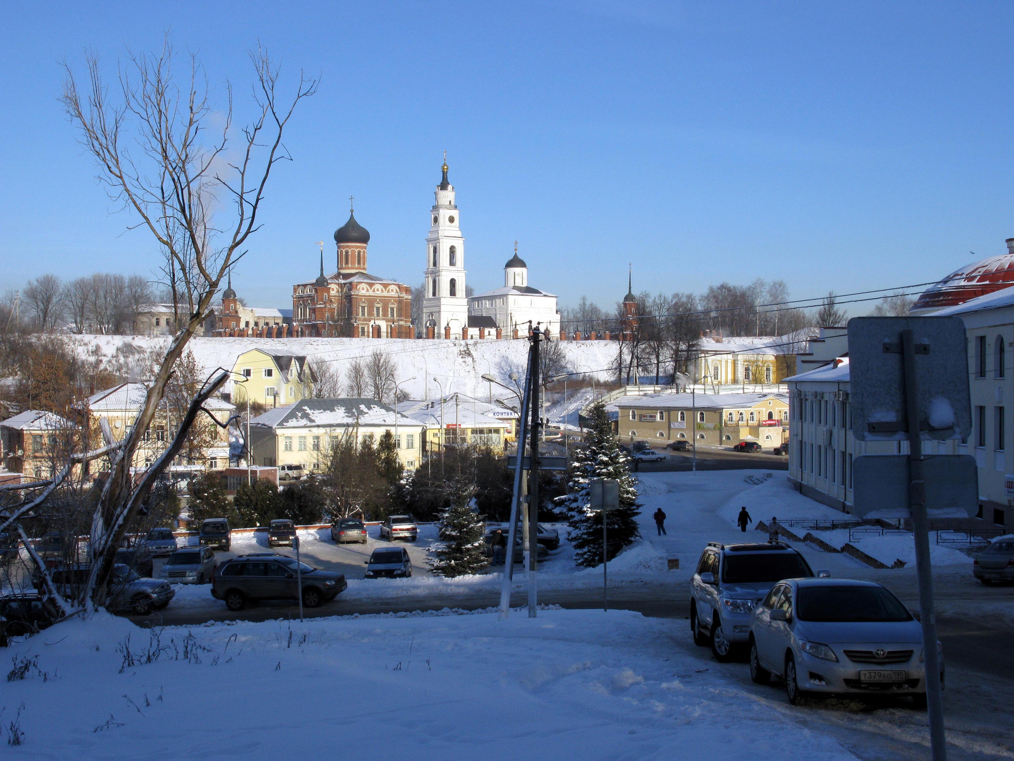 Волоколамск